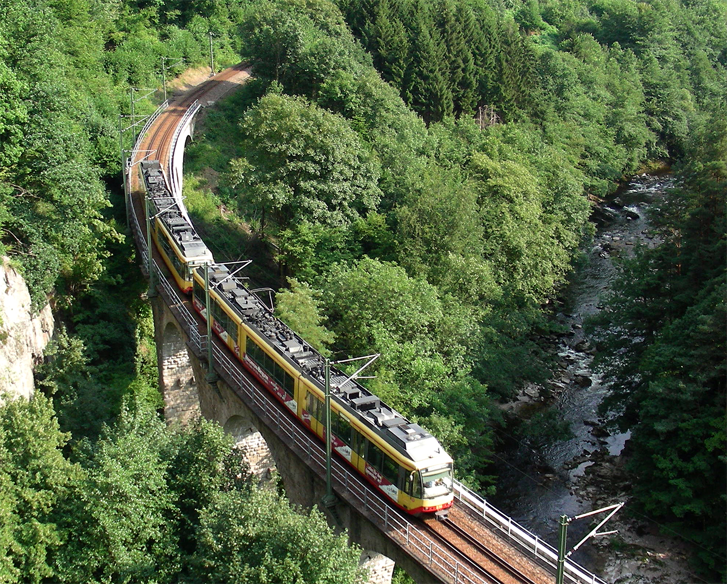 Stadtbahn auf der Tennetschluchtbrücke der Murgtalbahn